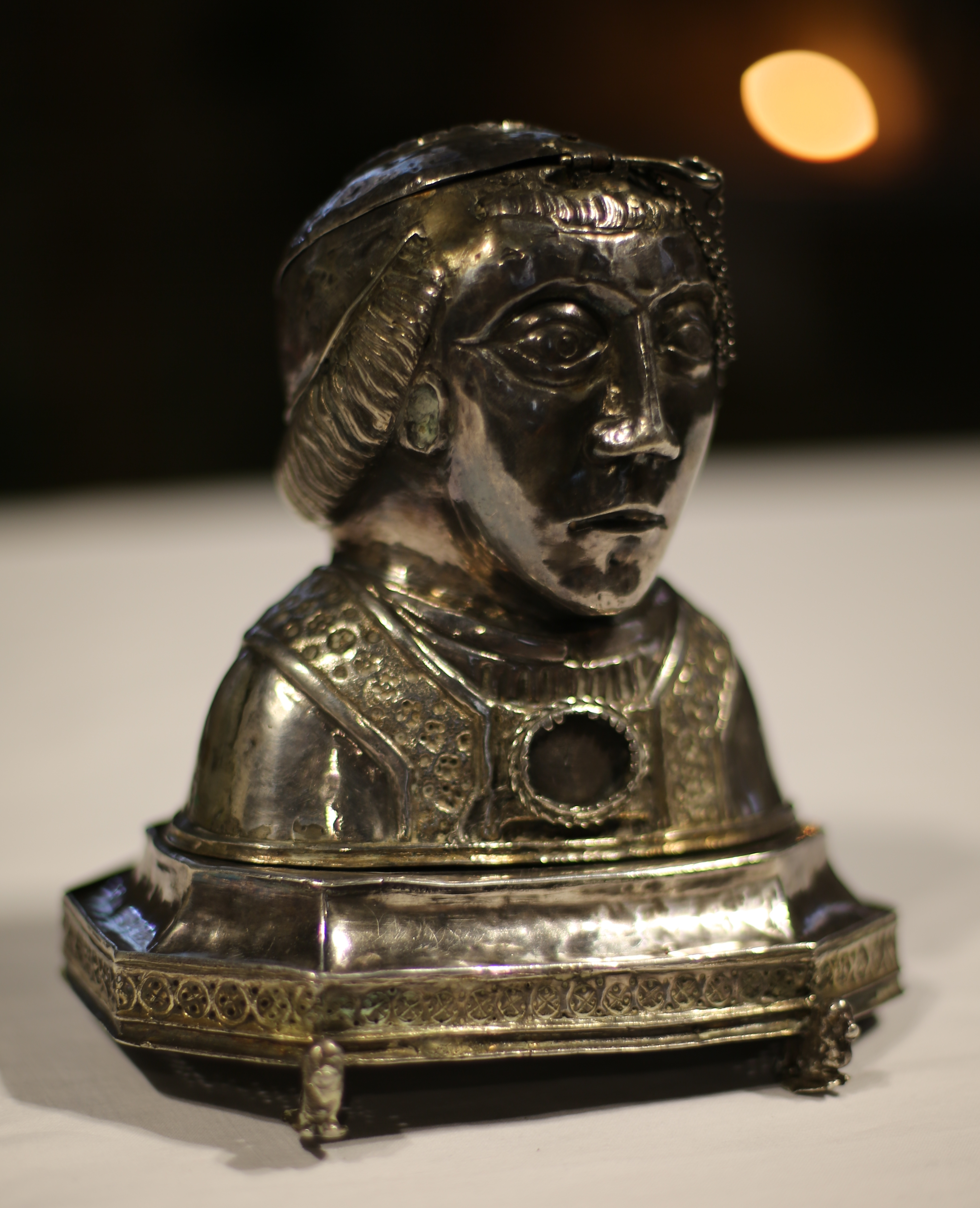 Buste reliquaire de saint Mériadec, , faisant partie du trésor de Saint-Jean-du-Doigt